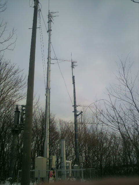 網走新町のミニサテTV中継局。左がデジタル、右がアナログ(廃局済み)。